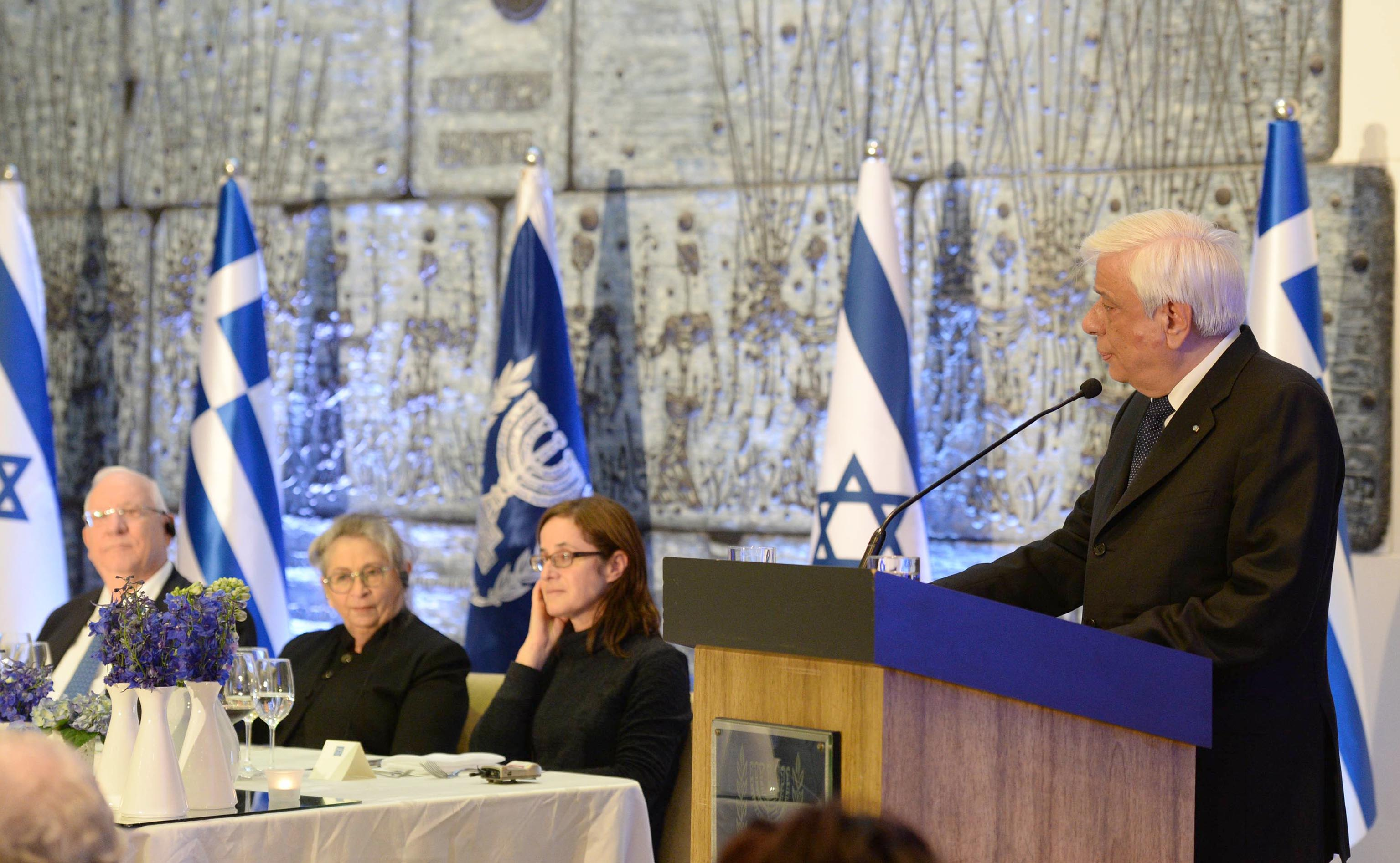 נשיא מדינת ישראל ראובן ריבלין מארח את נשיא יוון פרוקופיס פוולופולוס בעת ביקורו במדינת ישראל